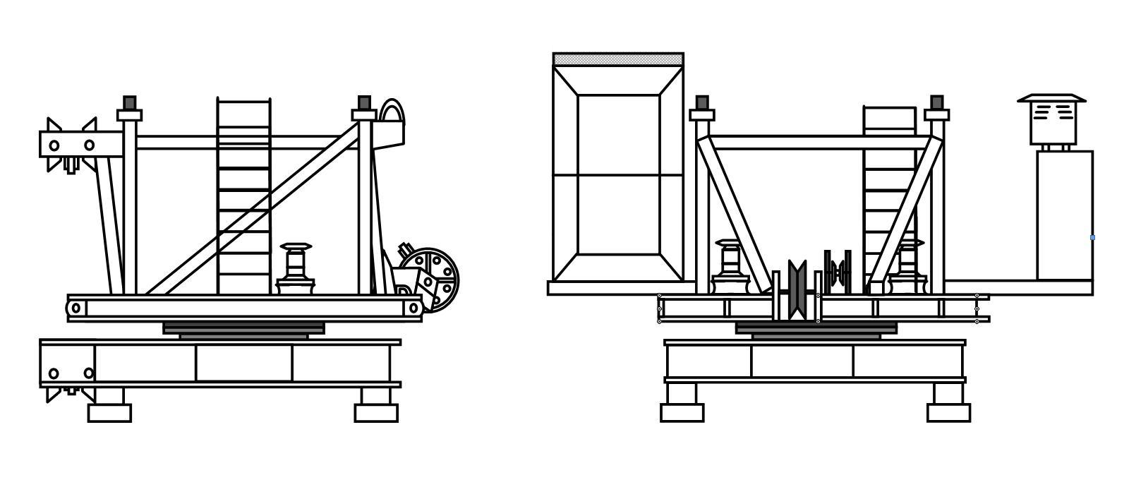 Поворотная часть - мой чертёж